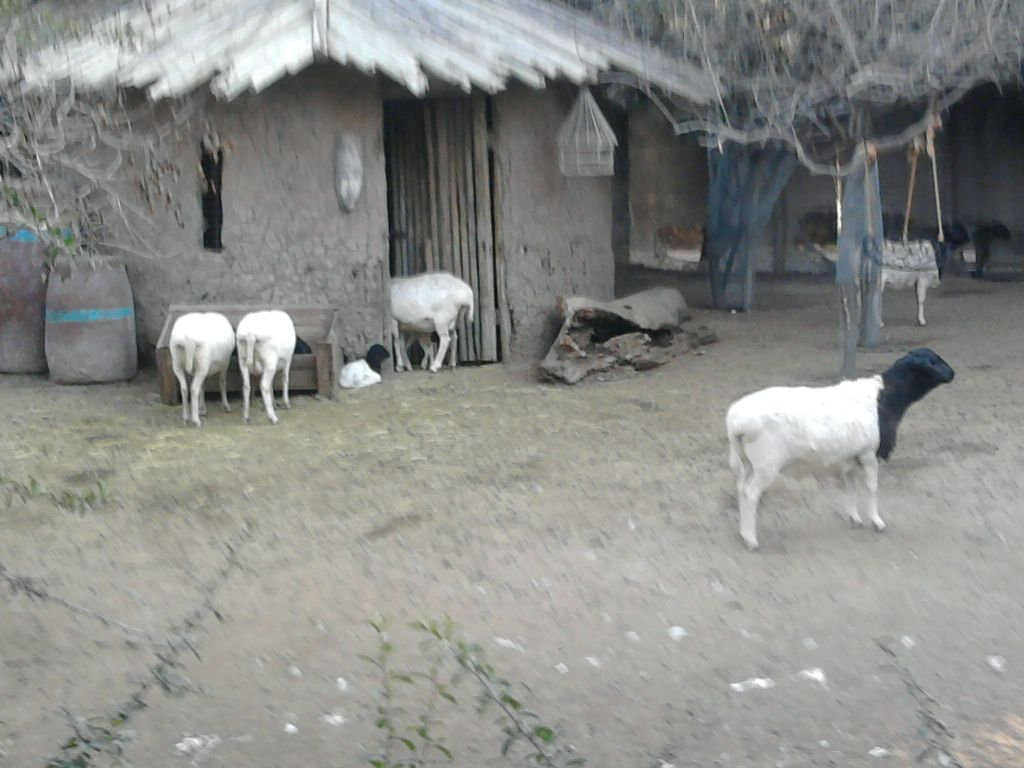 Ejemplares en la "Zoona Africana de Buin Zoo